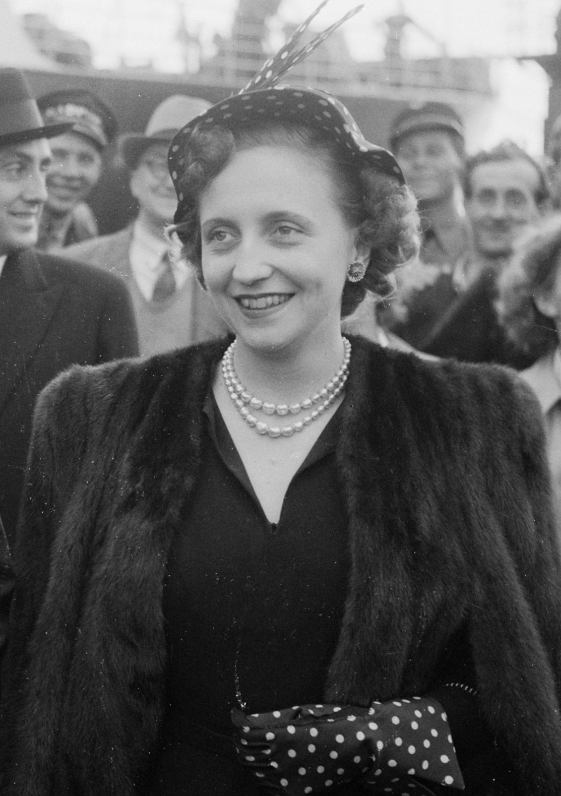 Aankomst van Margaret Truman, zangeres en dochter van de Amerikaanse president, in Hoek van Holland